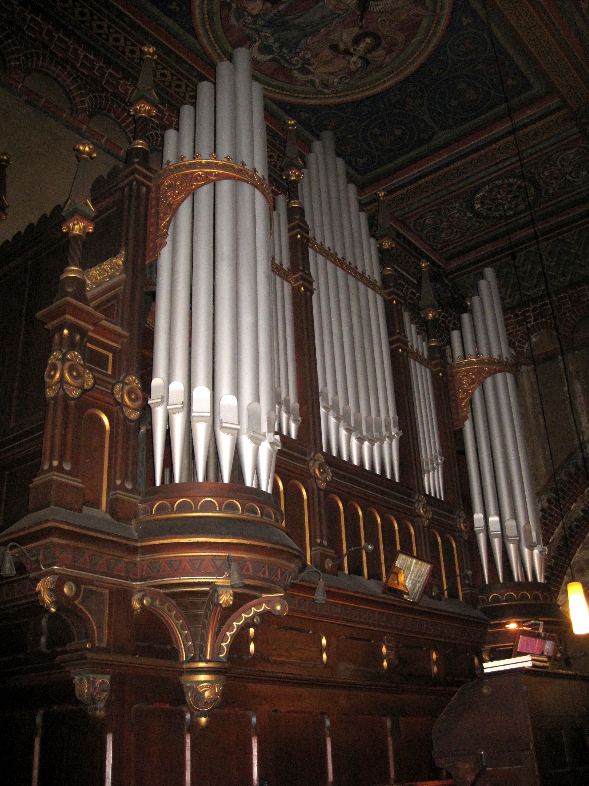 Sauer-Orgel aus dem Jahr 1893 in der Immanuelkirche in Berlin-Prenzlauer Berg, Immanuelstraße 1. Restaurierung durch G. F. Steinmeyer & Co.; Prospekt von Wilhelm Sagebiel.